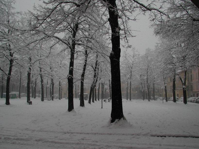 Piazza Fontanesi (Reggio Emilia) Immagine invernale di una piazza del centro di Reggio Emilia Immagine scattata da me nel marzo 2004 poco duratne la nevicata e rilasciata sotto licenza tipo GNU